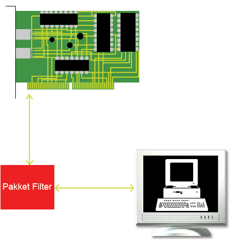 Zelf getekend, dus rechtenvrij.